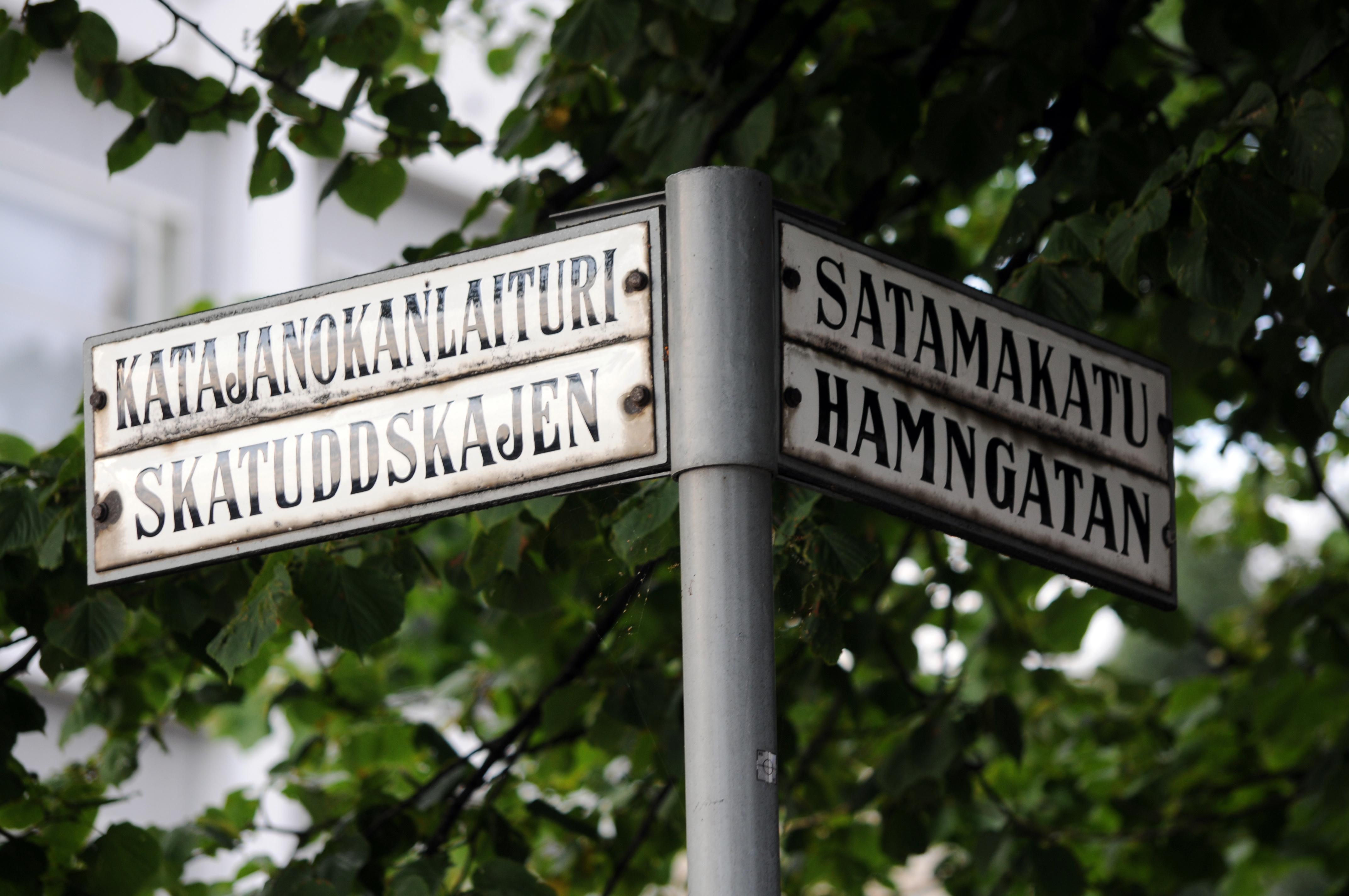 Helsinki